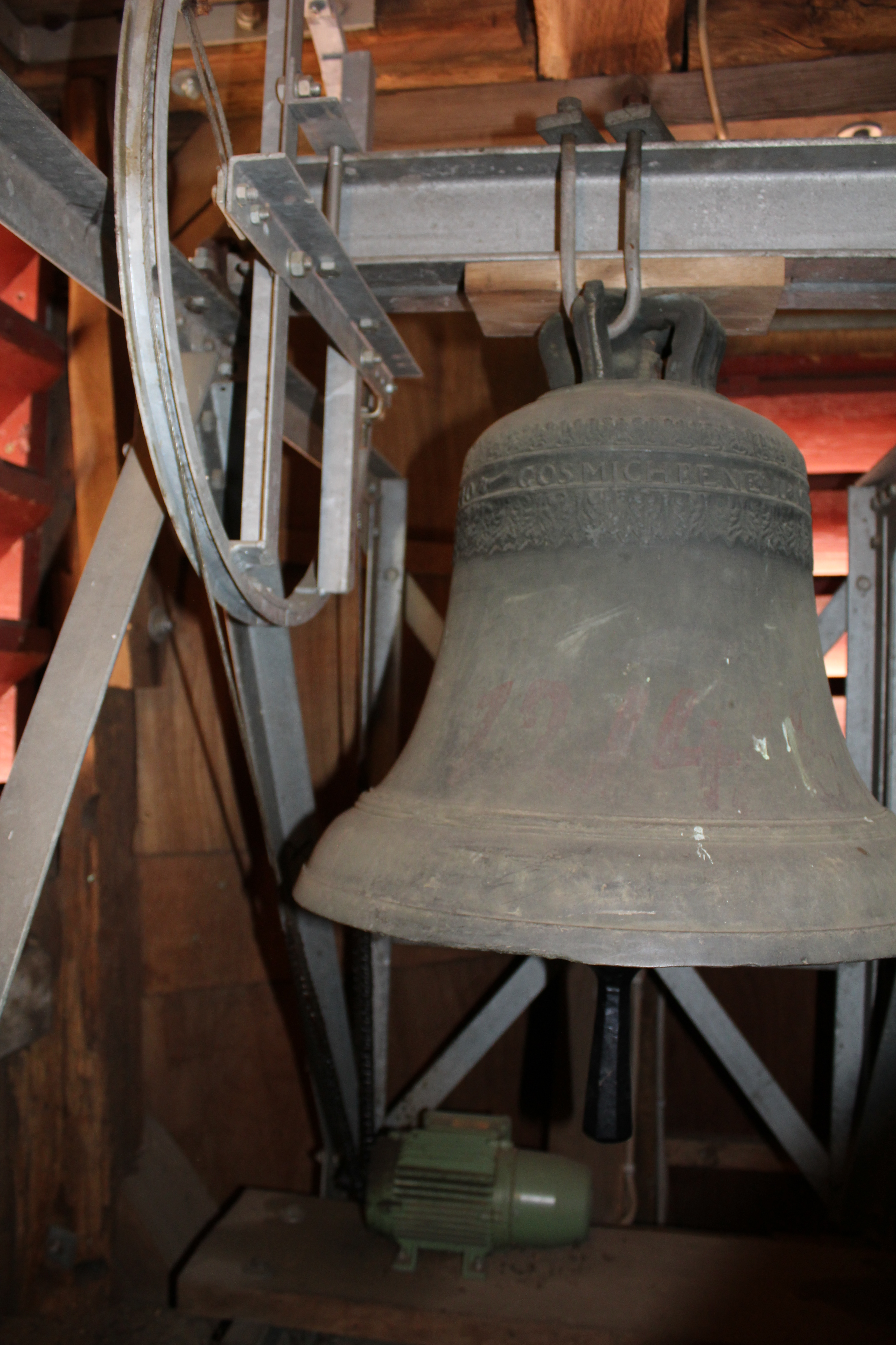 Evangelische Kirche Fauerbach, Nidda, Wetteraukreis, Hessen, Deutschland